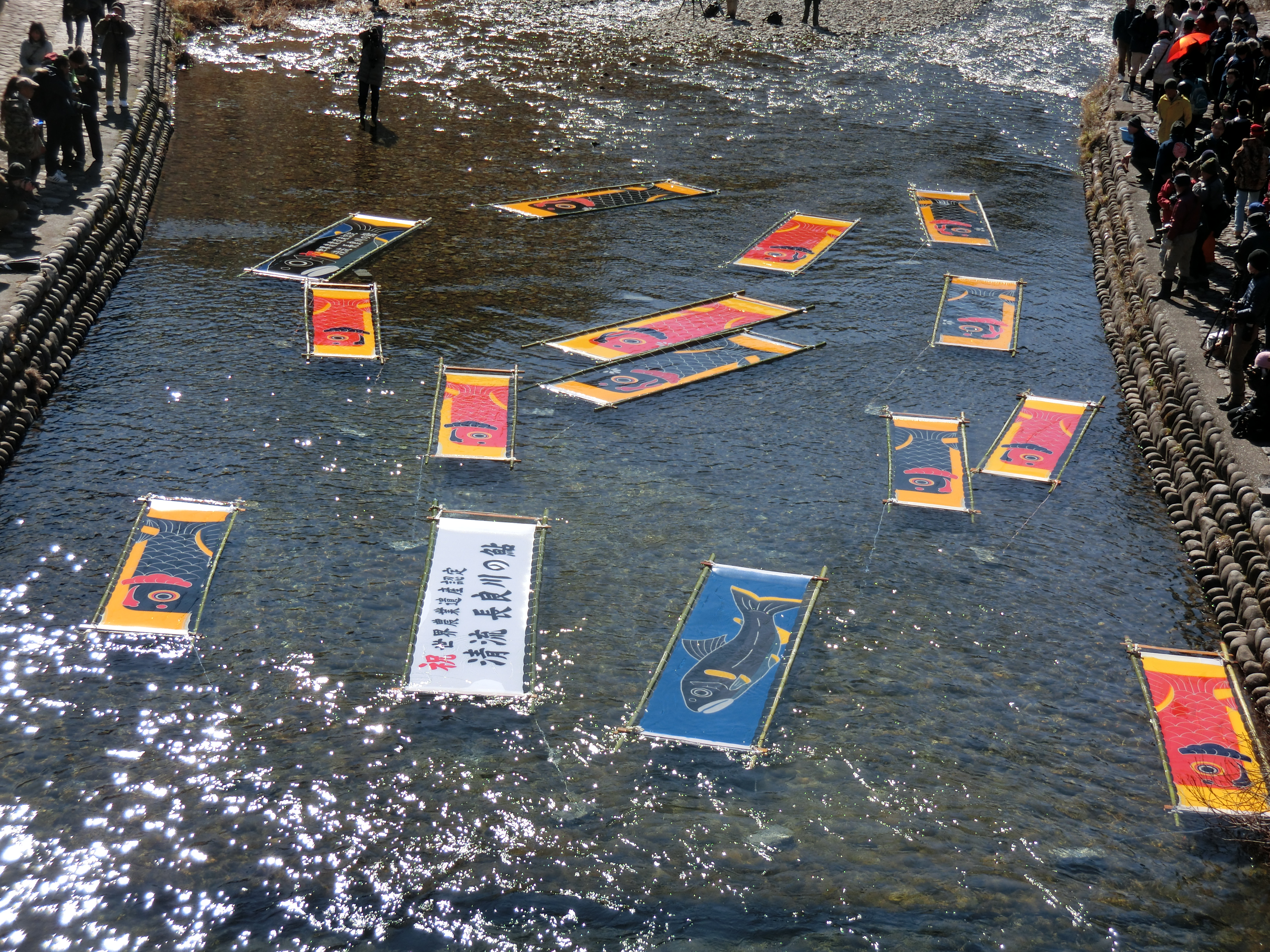 岐阜県郡上市八幡町小駄良川で1月に行われた鯉のぼりの寒ざらし